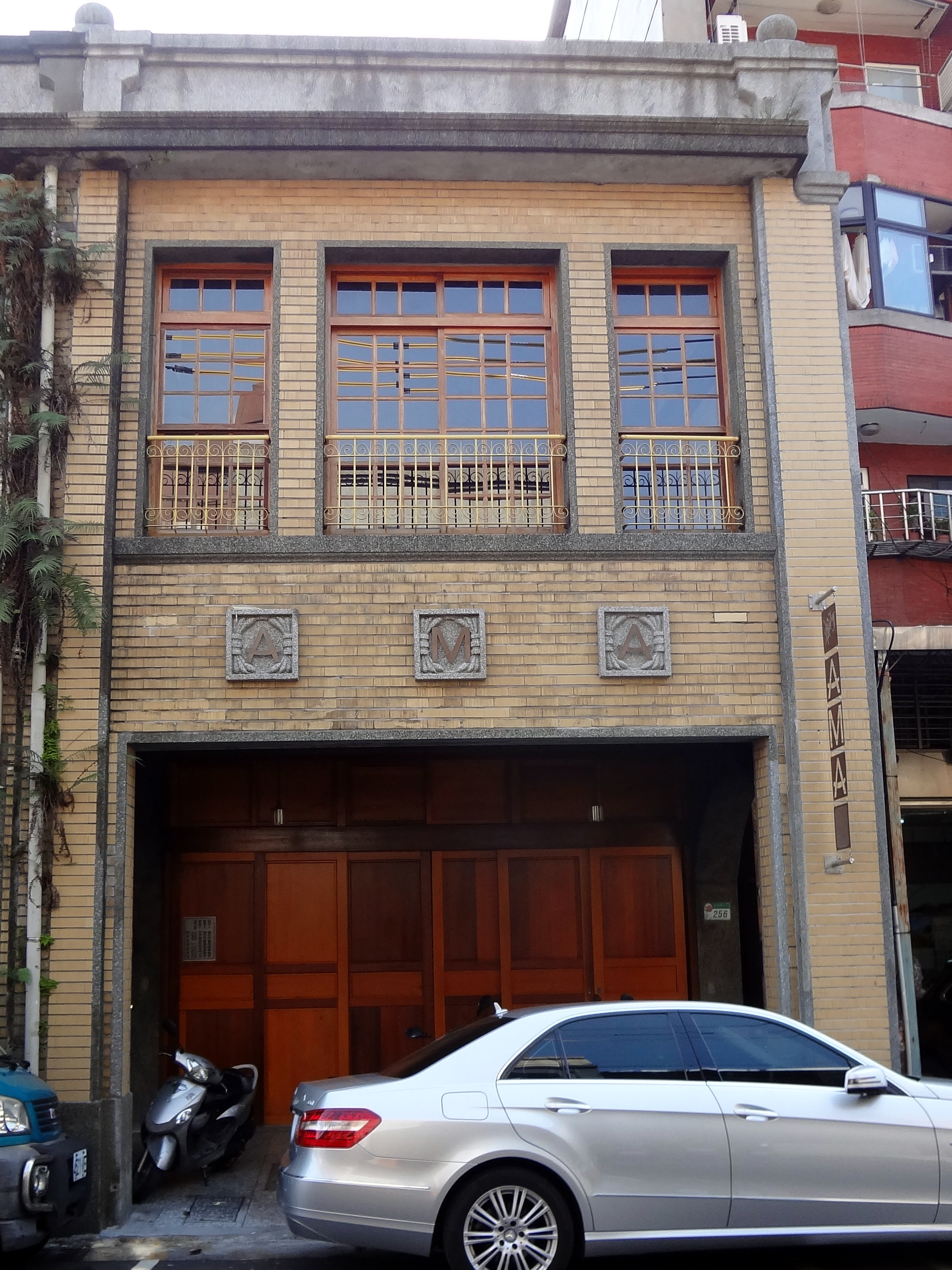 阿嬤家-和平與女性人權館正面，開館前的外貌。